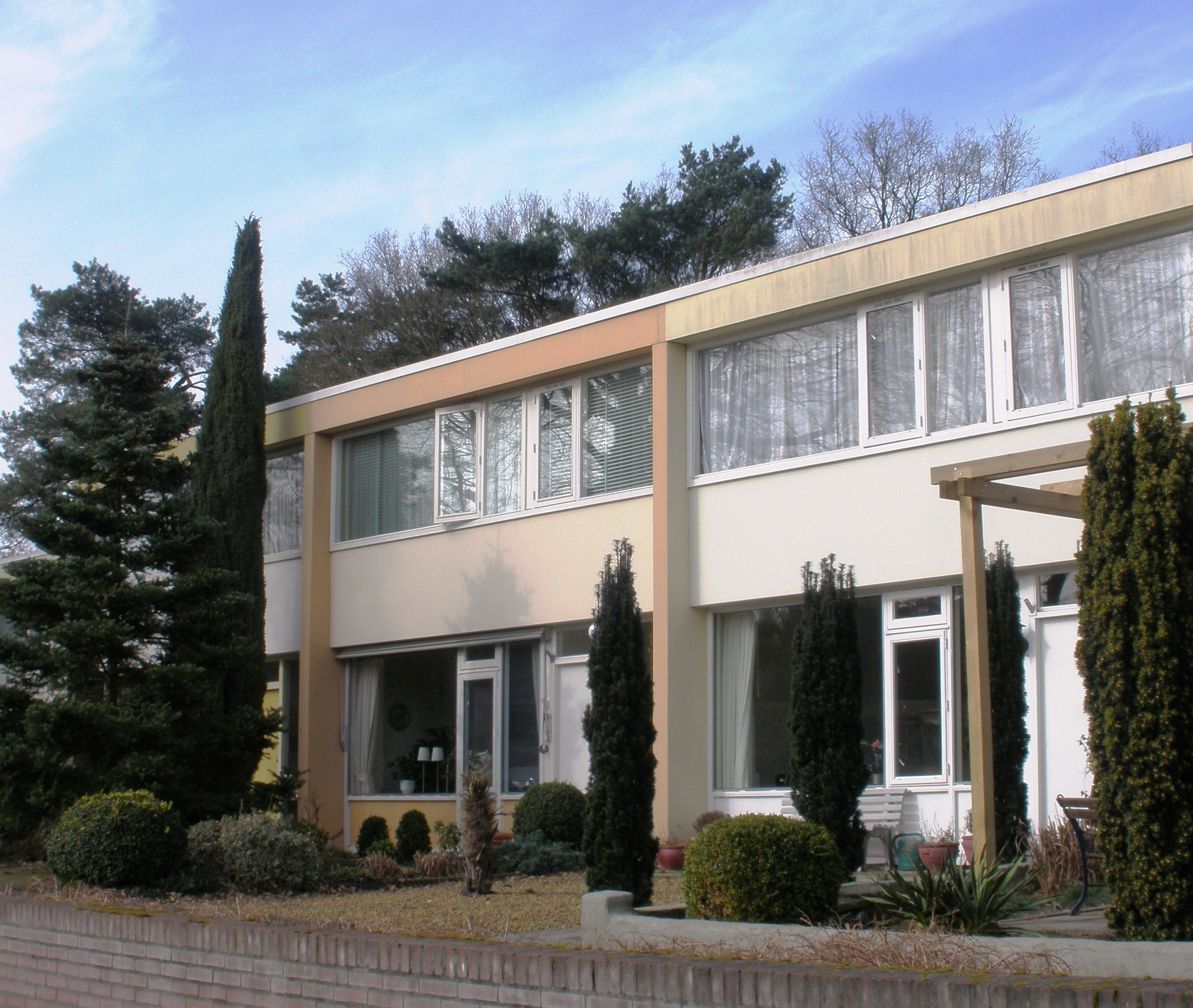 Huizen aan de Laan van de Eekharst in de wijk Emmerhout van Emmen.